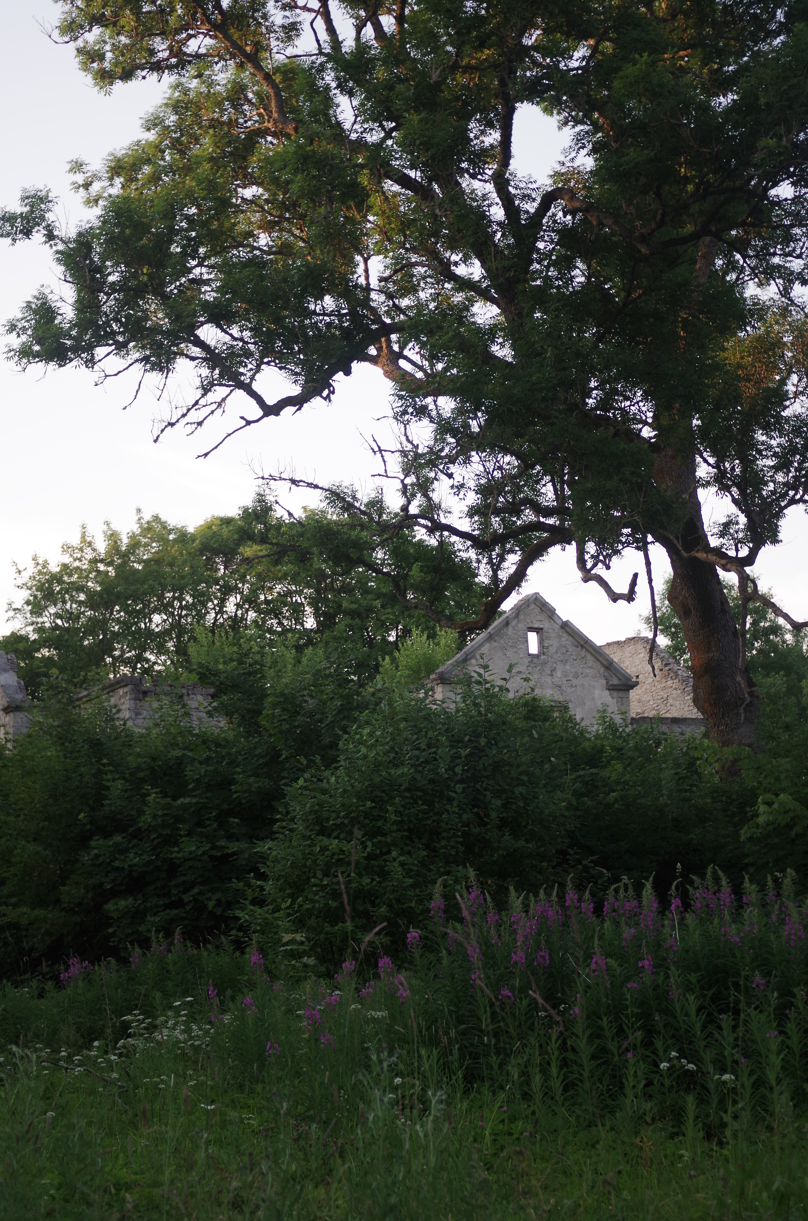 Pilt aastast 2014. Kasti küla, Kaarma vald, Saare maakond.